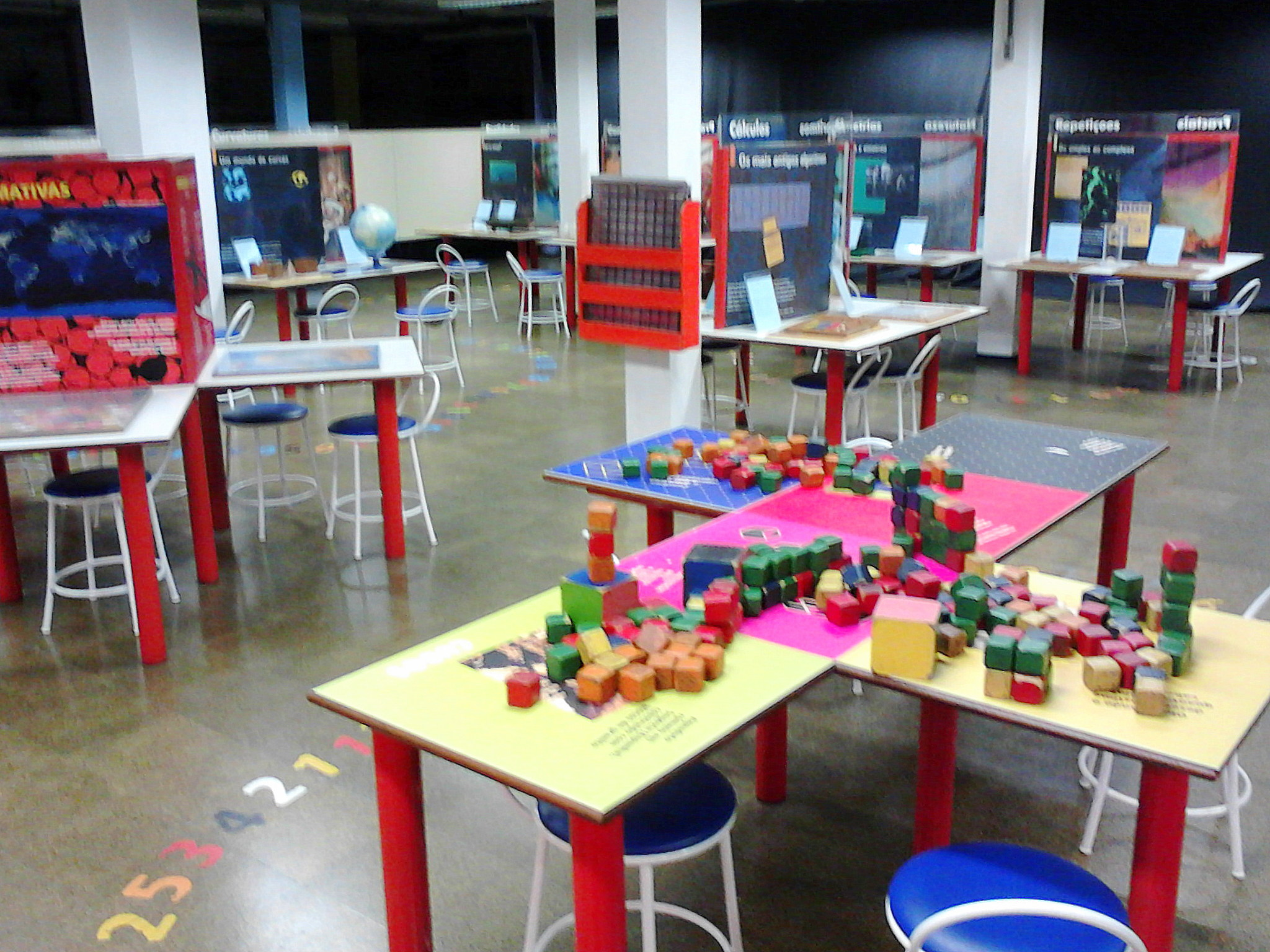 Ludoteca na Exposição Matemática, Estação Ciência, SP.